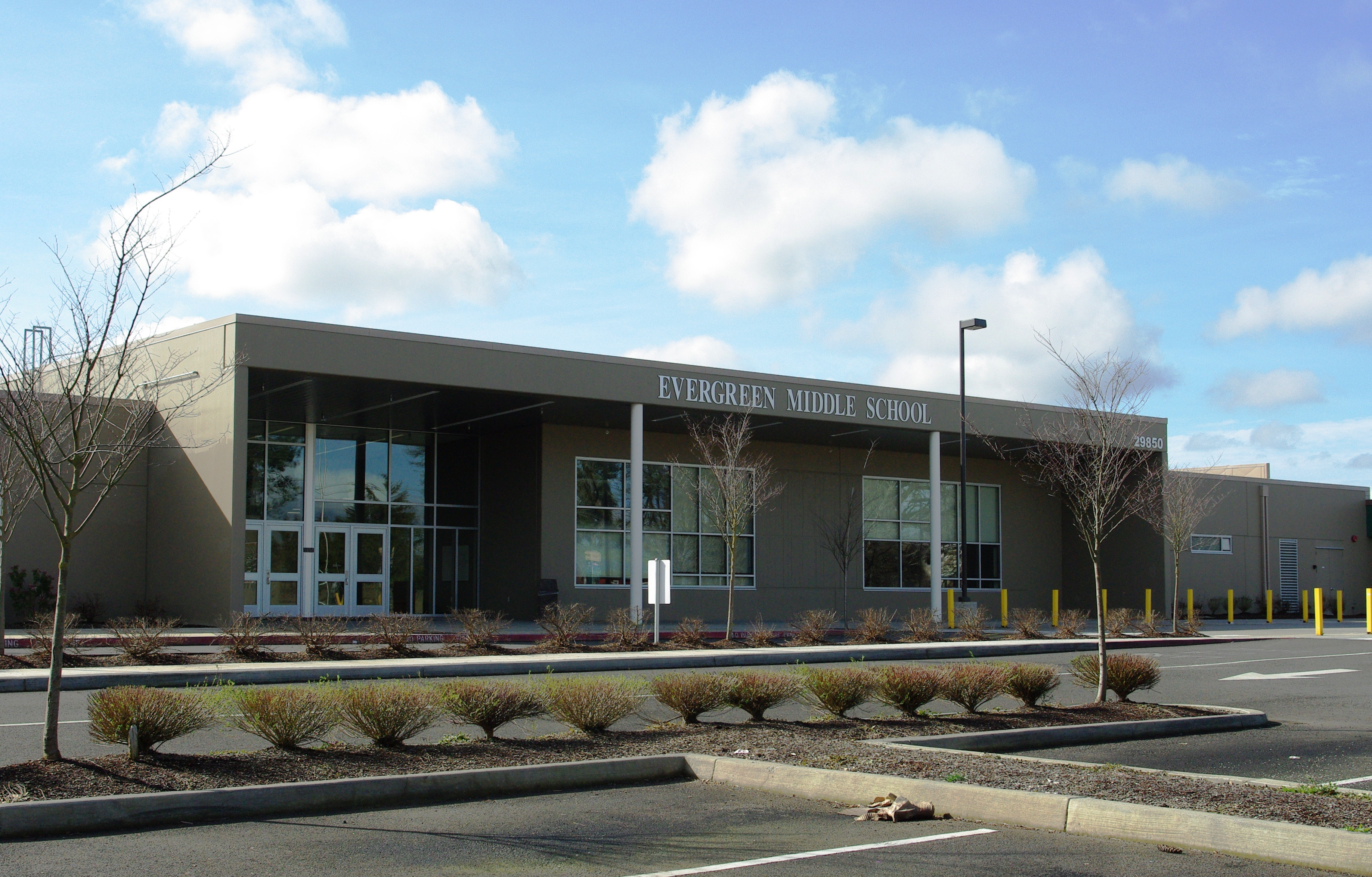 Evergreen Middle School in Hillsboro, Oregon, USA.